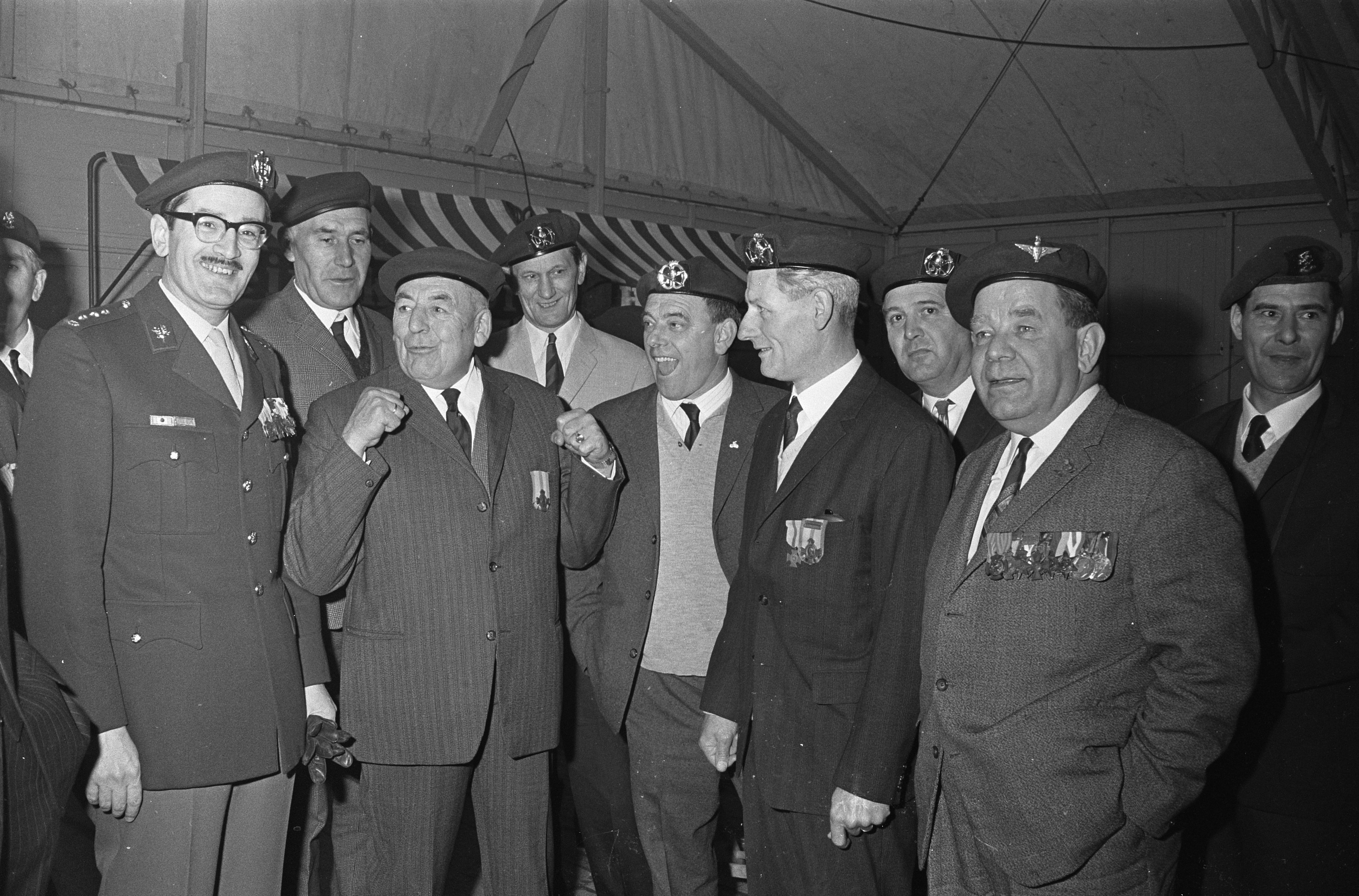 Collectie / Archief : Fotocollectie Anefo Reportage / Serie : [ onbekend ] Beschrijving : Vijfentwintig jaar Korps Commandotroepen, Kapitein b.d. P. J. Mulders (rechts) met enkele mannen van eerste uur Datum : 31 maart 1967 Trefwoorden : COMMANDOTROEPEN, jubilea Persoonsnaam : P. J. Mulders Fotograaf : Merk, Ben / Anefo Auteursrechthebbende : Nationaal Archief Materiaalsoort : Negatief (zwart/wit) Nummer archiefinventaris : bekijk toegang 2.24.01.05 Bestanddeelnummer : 920-1963